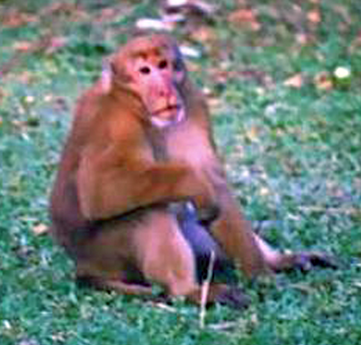 Macaque d'Assam mâle. Photo M. Cooper avec son aimable autorisation.